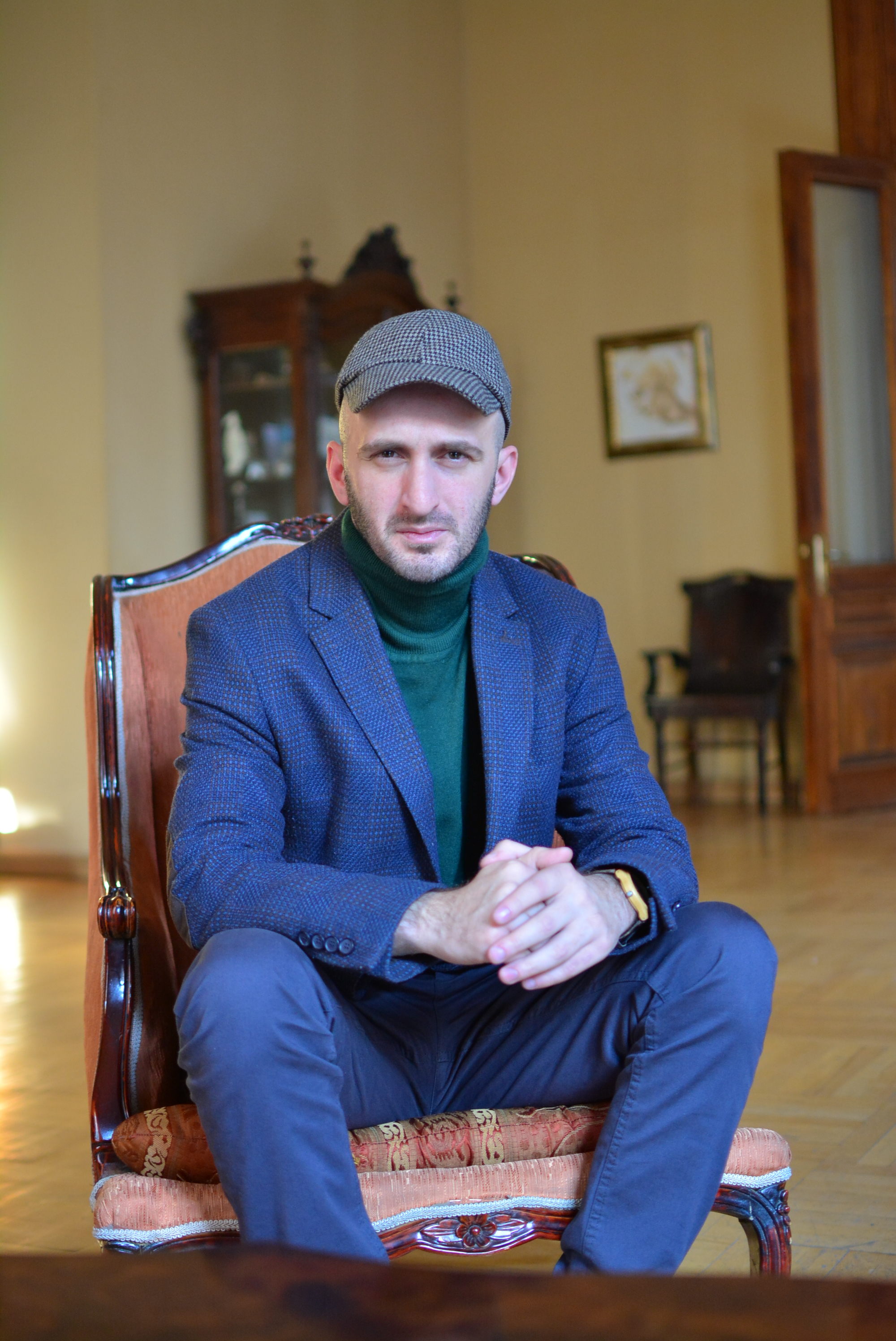 გიორგი კეკელიძე ეროვნულ ბიბლიოთეკაში